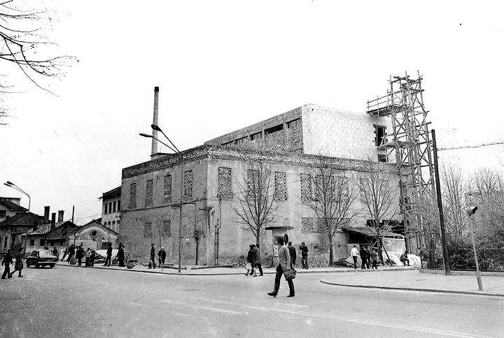 Бивша кожарска фабрика Габрово